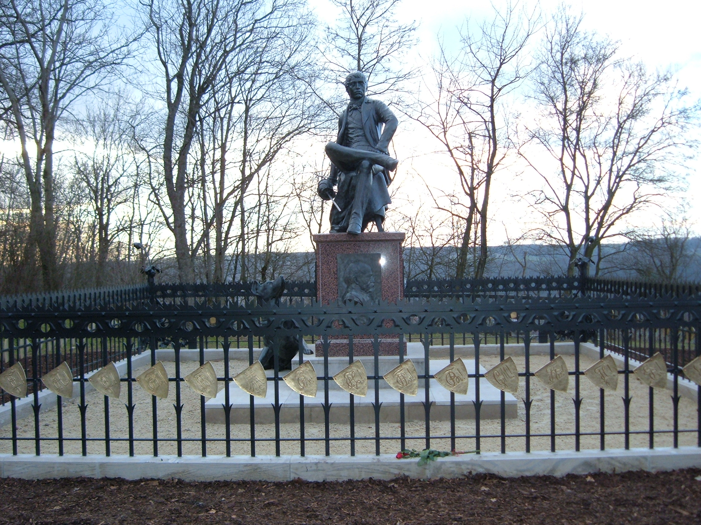 Das Bismarck-Denkmal in Bad Kösen nach der Restaurierung